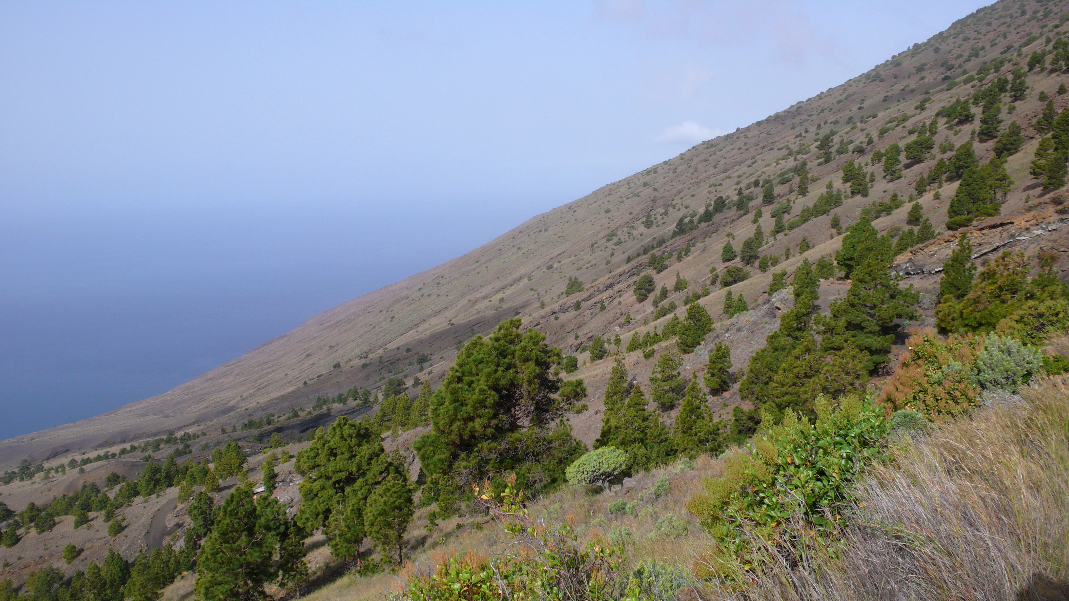 Vista de las laderas del Julan. El Hierro. Islas Canarias.